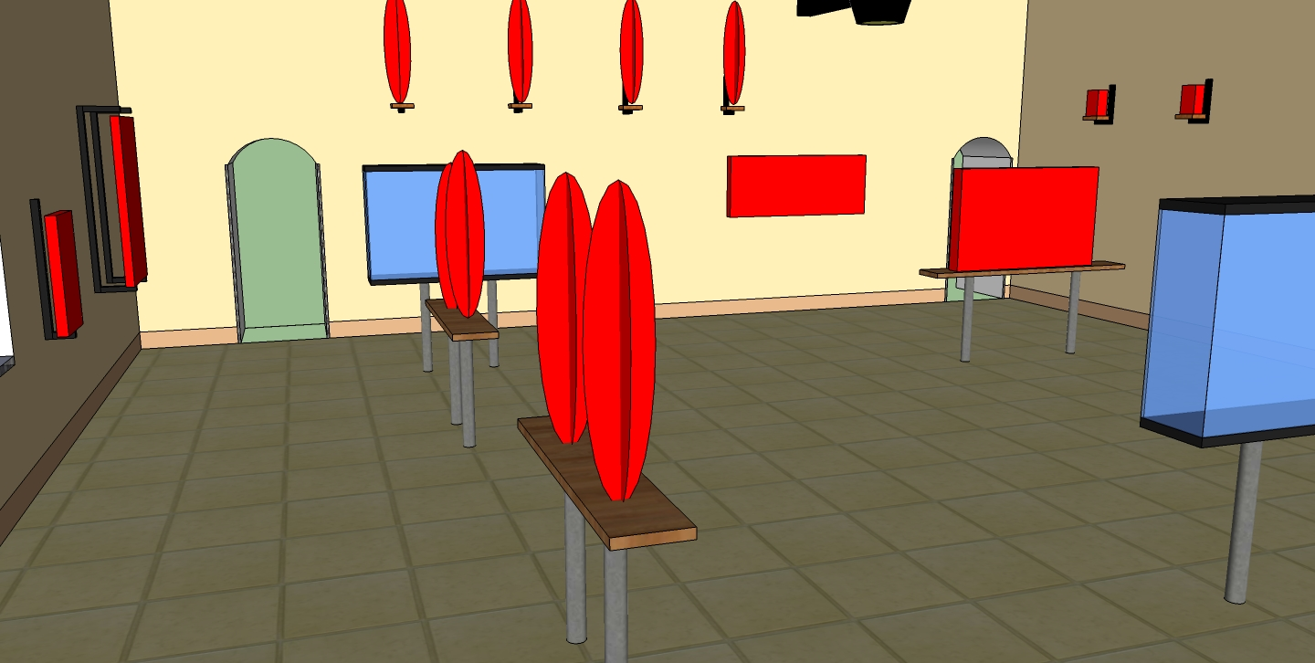 Sala XI SketchUp IMAG1